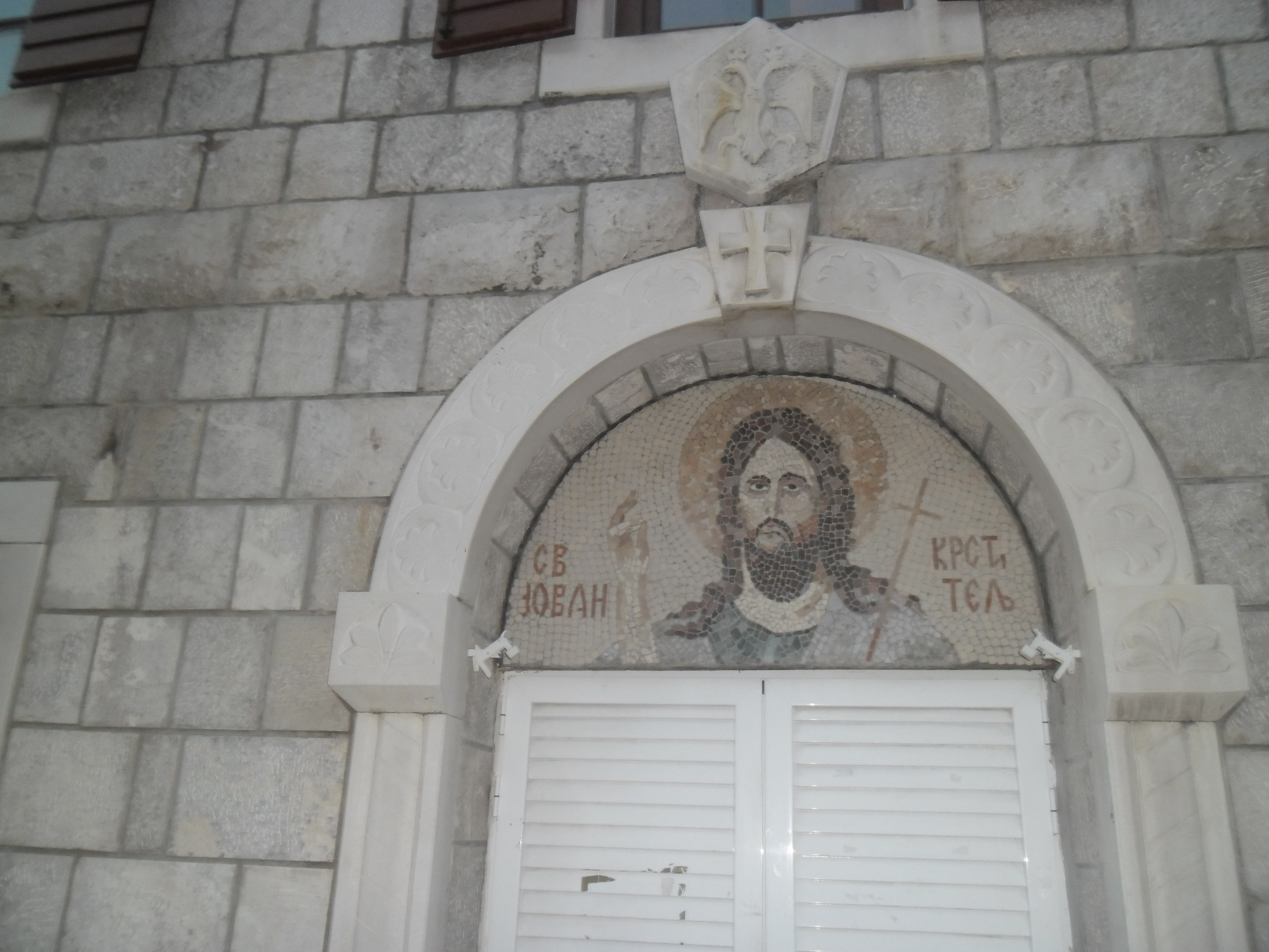 Cetinje